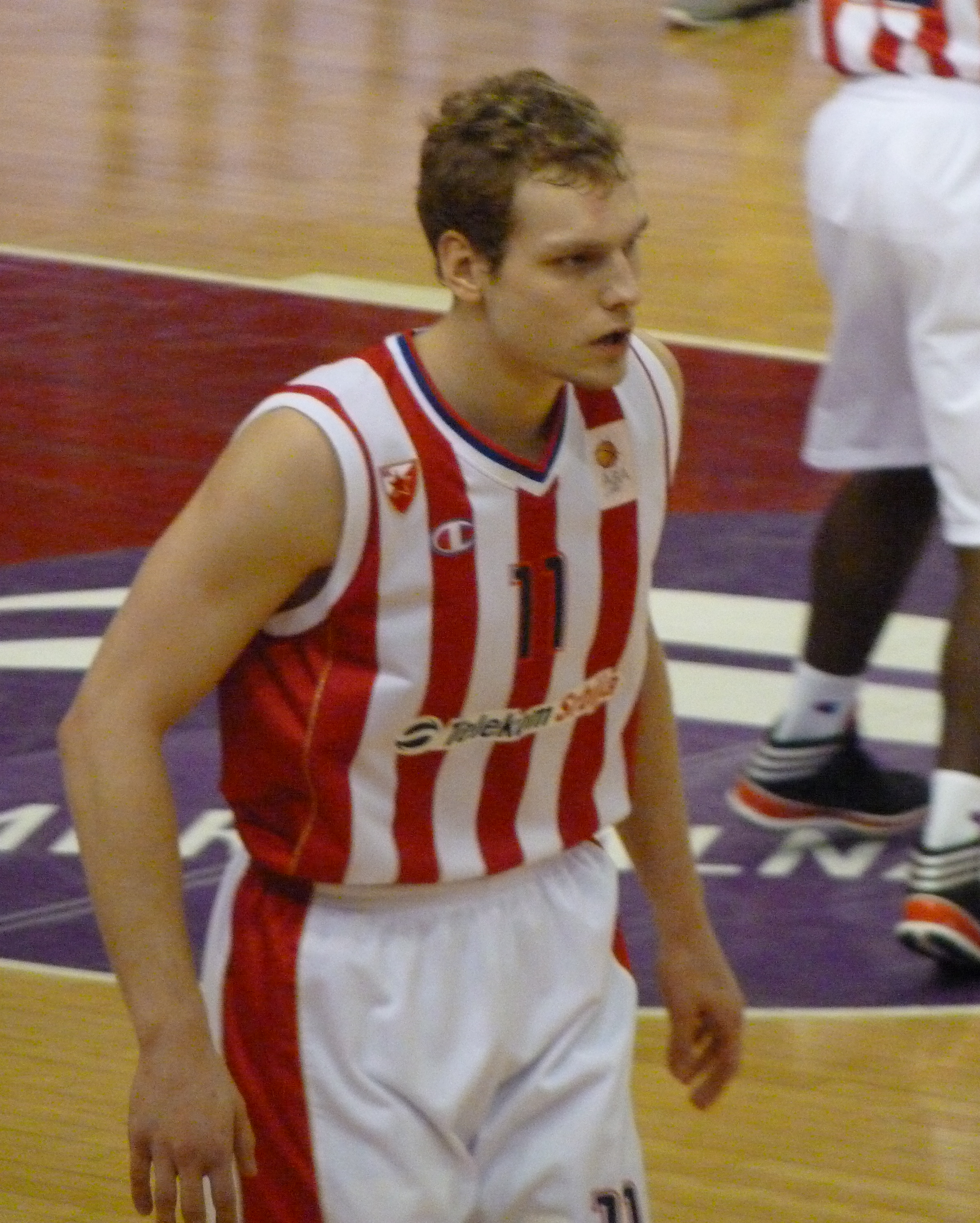 Jaka Blažič